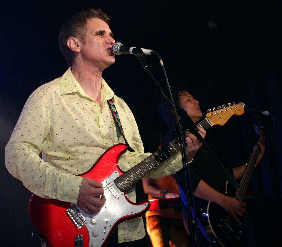 The Rubinoos en Barcelona el 5 de Febrero de 2009, podéis leer una crónica del conncierto en (This is a smaller, cropped version of the original picture)